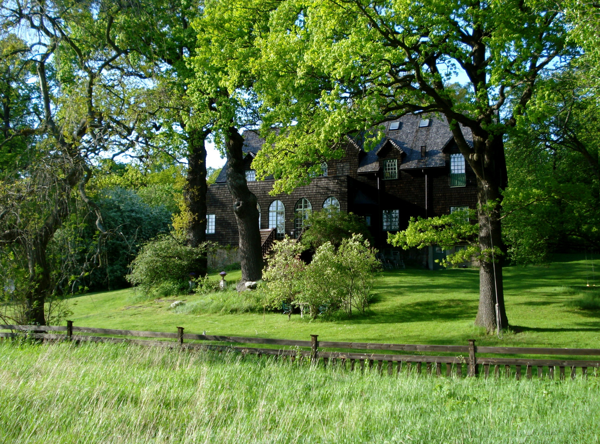 Djurgården